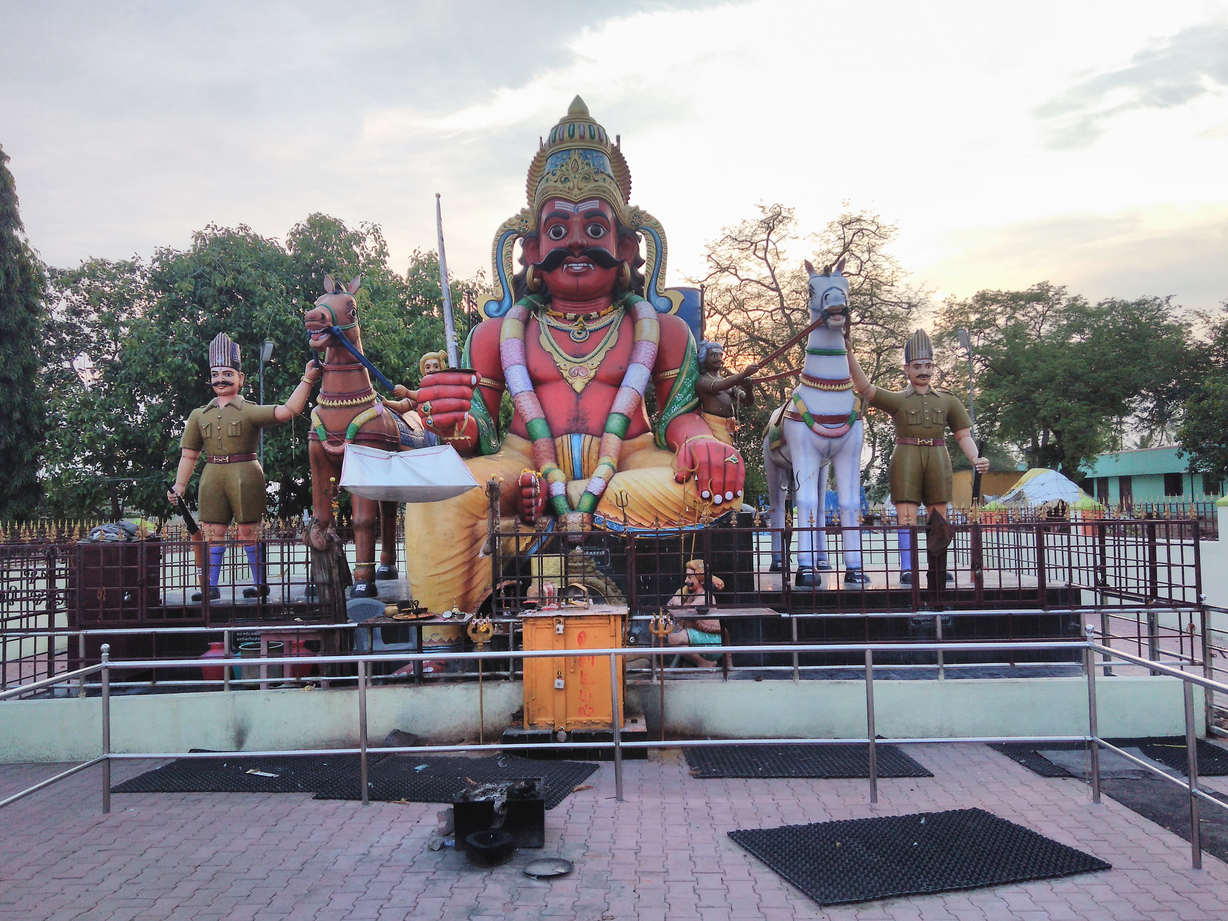 பி.அக்ராகரம் முனியப்பன்